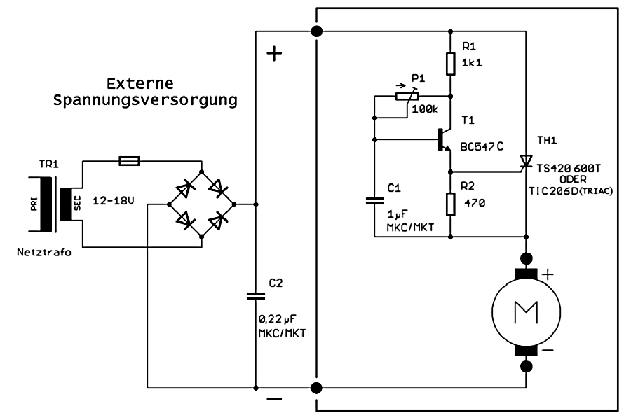 Thyristorsteuerung für DC-Motoren mit doppelter Netzfrequenz.